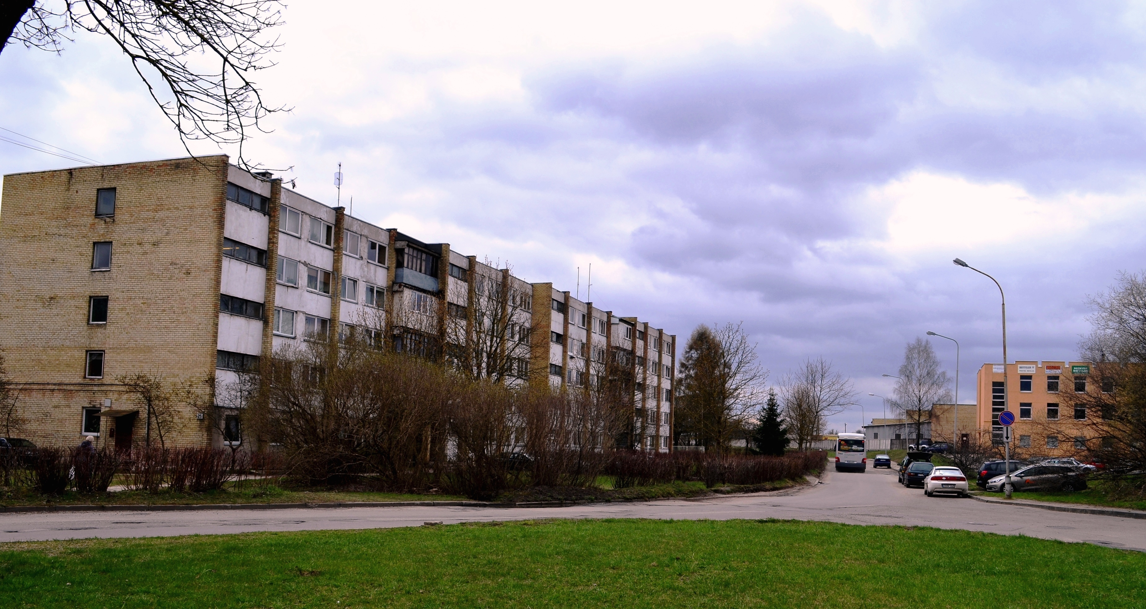 Rodūnios kelias, Kirtimai, Vilnius